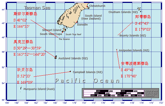 自己画的图